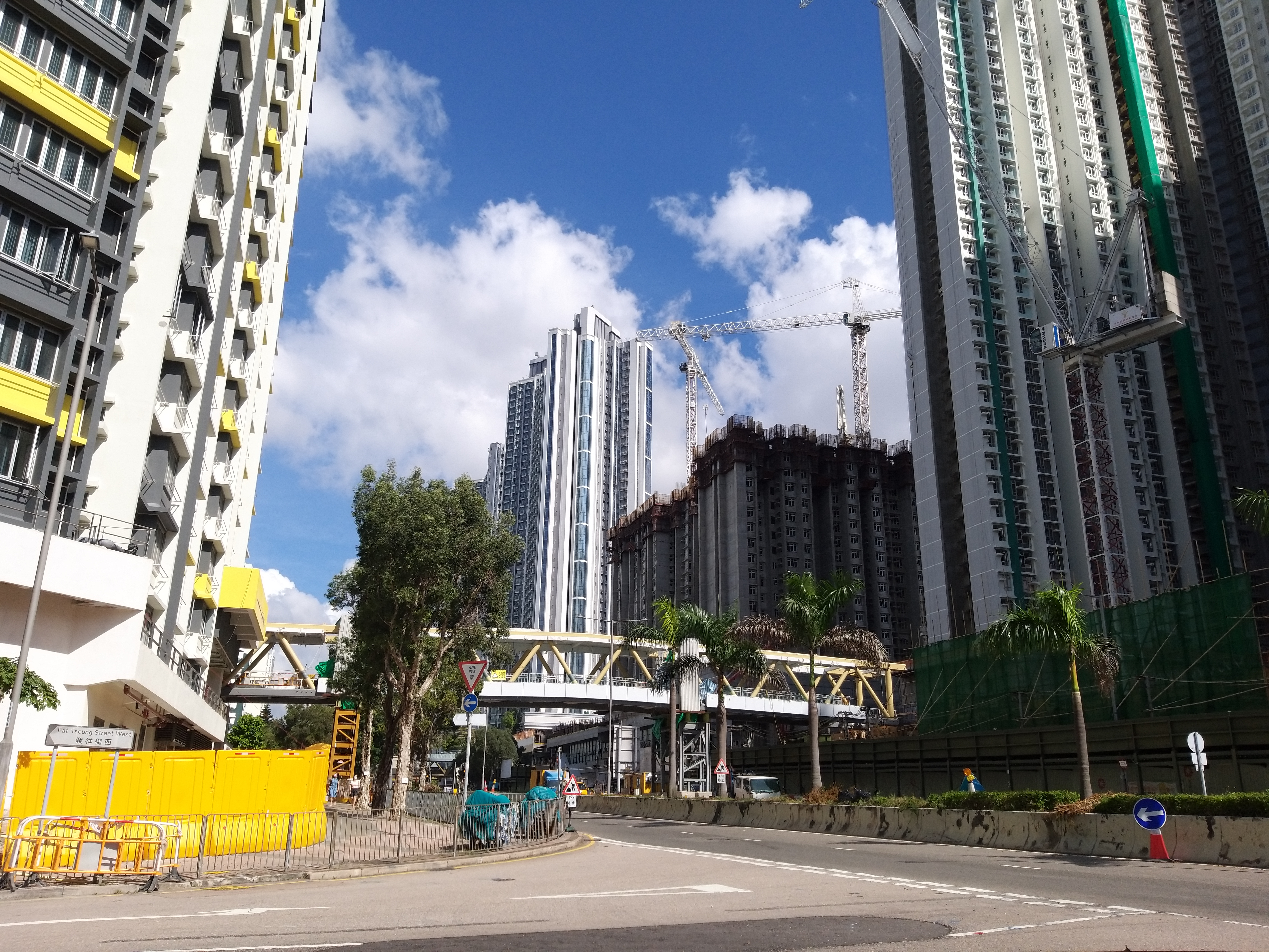 隨著海達街市平台層開始澆築，天橋亦即將合攏